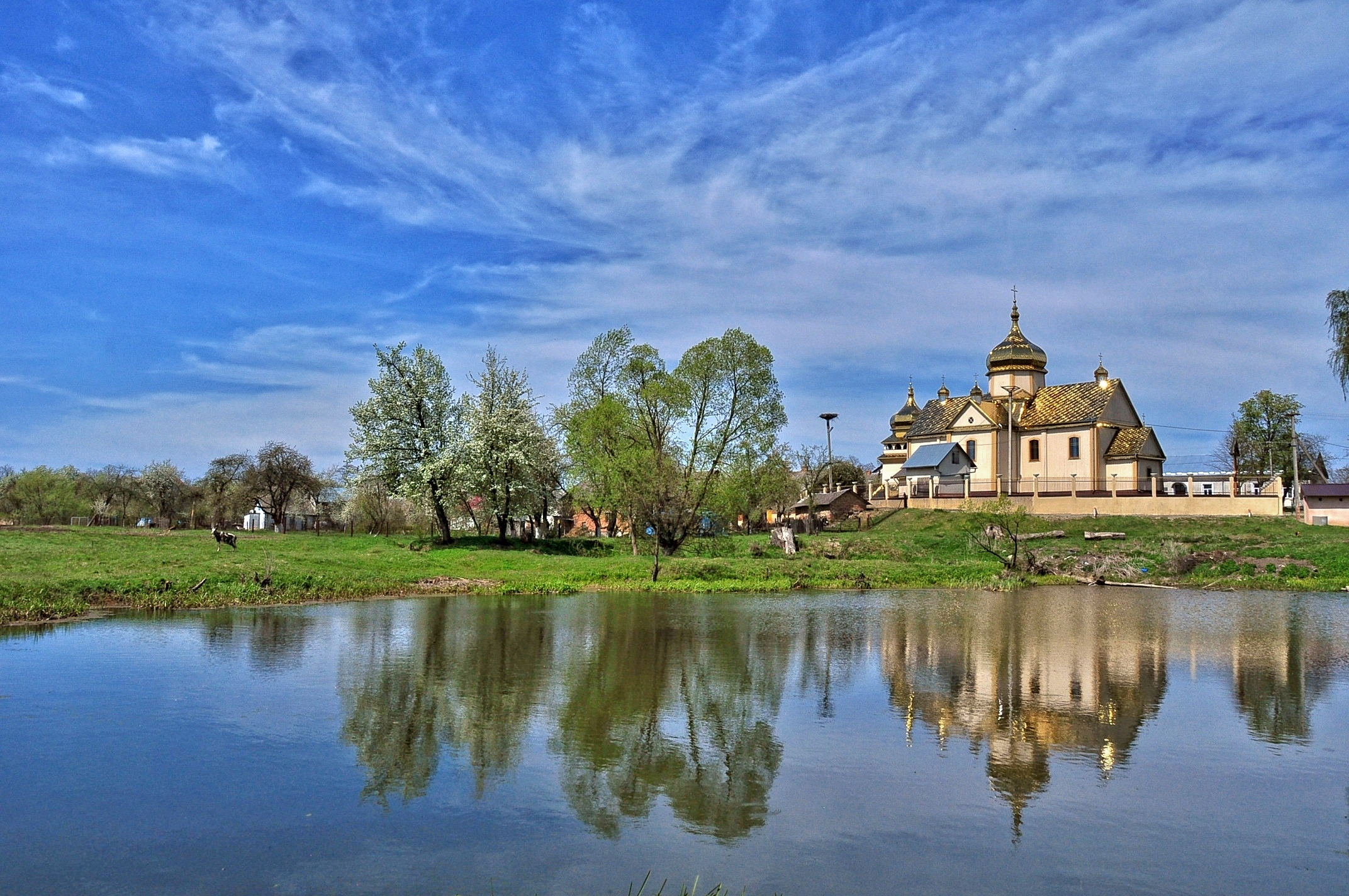 Панорама с. Наконечне Перше з церквою Успіння Пресвятої Богородиці (УПЦ КП), школою та ставком